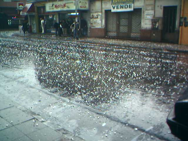 Granizo gigante caido en buenos aires en julio del 2006.}